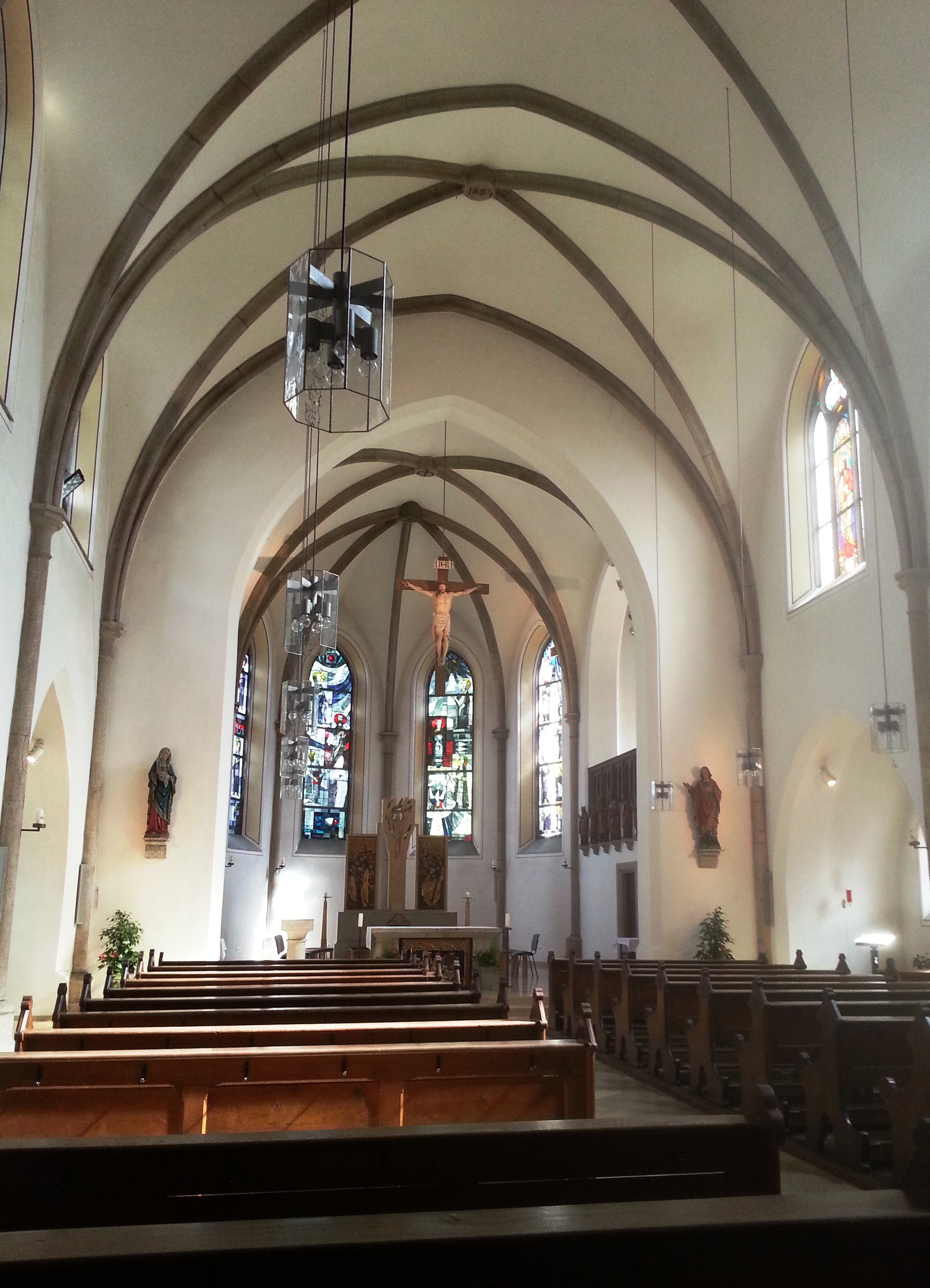 Kath. Kirche Zwölf Apostel, Wunsiedel (Inneres)